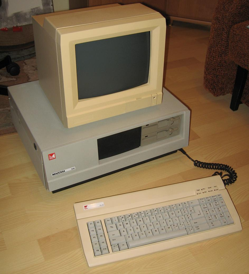 Mikrokomputer Mazovia 1016 z podwójną stacją dyskietek 5,25", monitorem MM12P i klawiaturą KL10